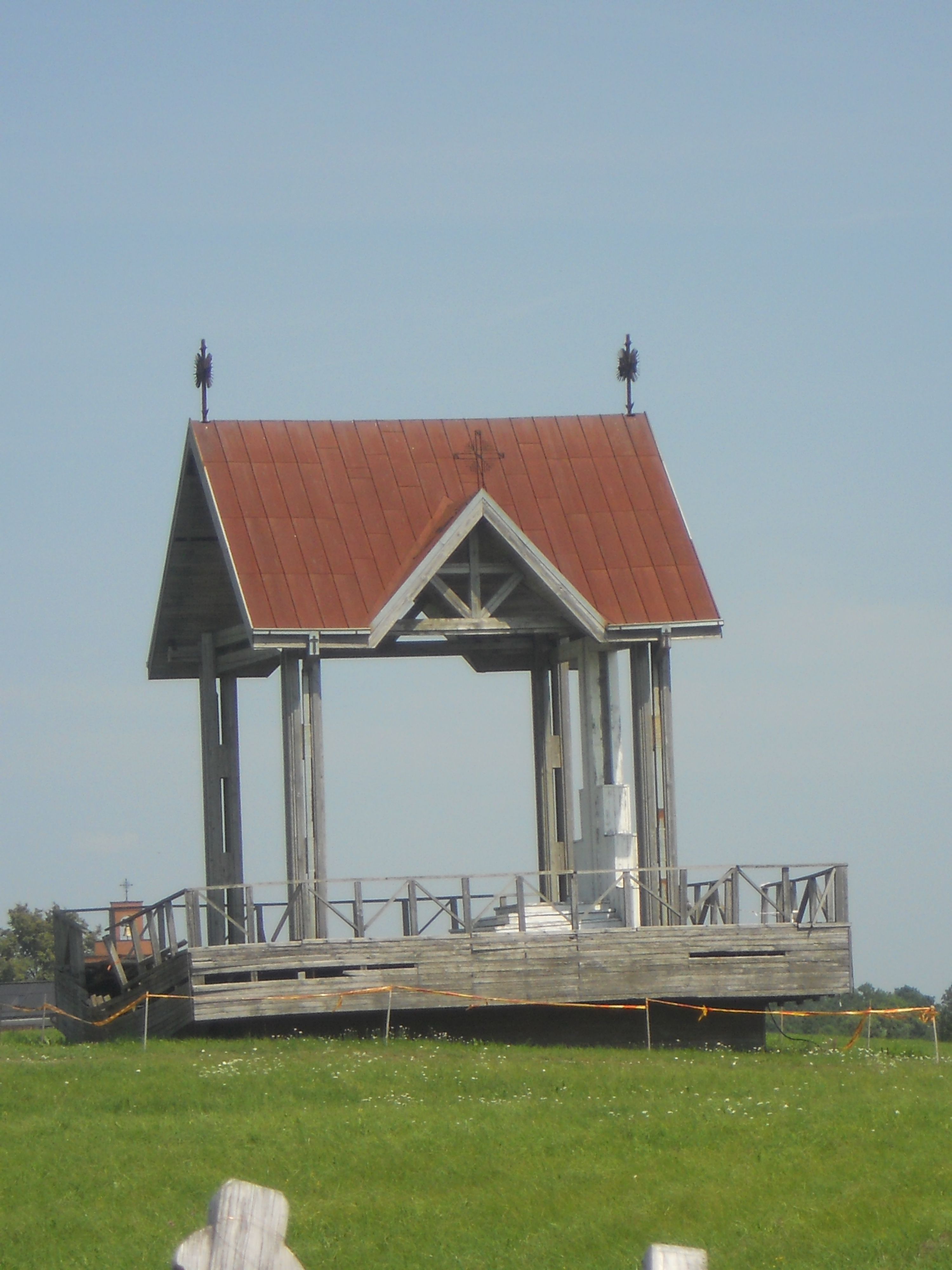 Photographie prise en visitant la Colline des croix , près de Šiauliai, en Lituanie.